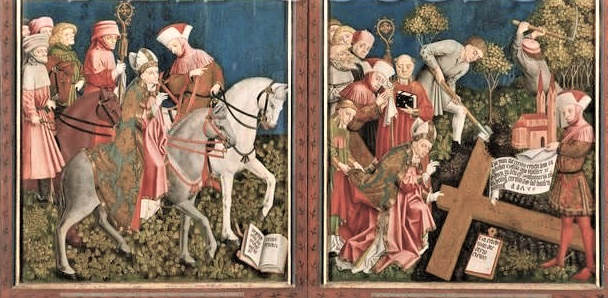 Kreuzaltar der ehemal.Augustiner-Stiftskirche in Polling, Innenseiten der Flügel, hier: Abbildung der unteren Hälfte